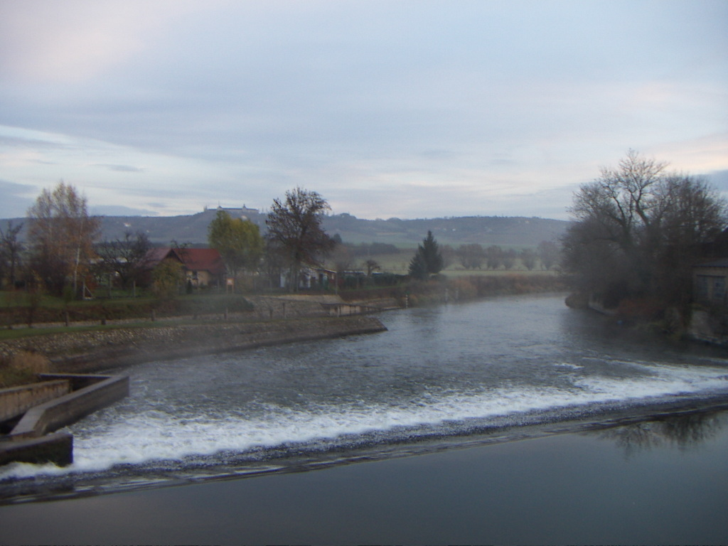 Unstrutwehr in Laucha am Feengrotten-Kyffhäuser-Fernwanderweg